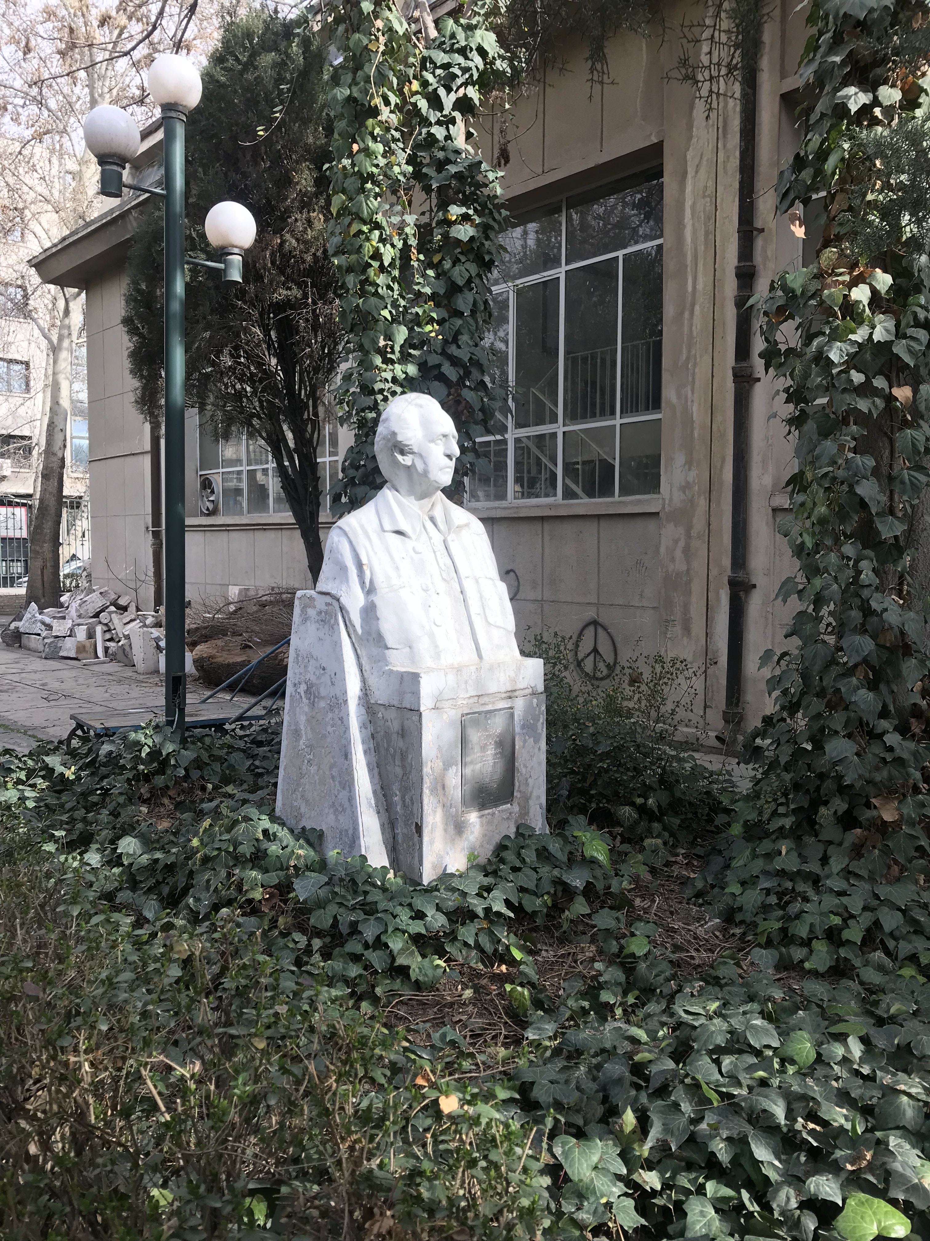 این تندیس در راهرویی متروک جنب سالن مجسمه سازی دانشگاه تهران کنارگذاشته شده است. امکان مشاهده مستقیم اثر برای عابران وجود ندارد. تصویر گویایی وضعیت ناخوشایند نحوه نگهداری تندیس مزبور است.